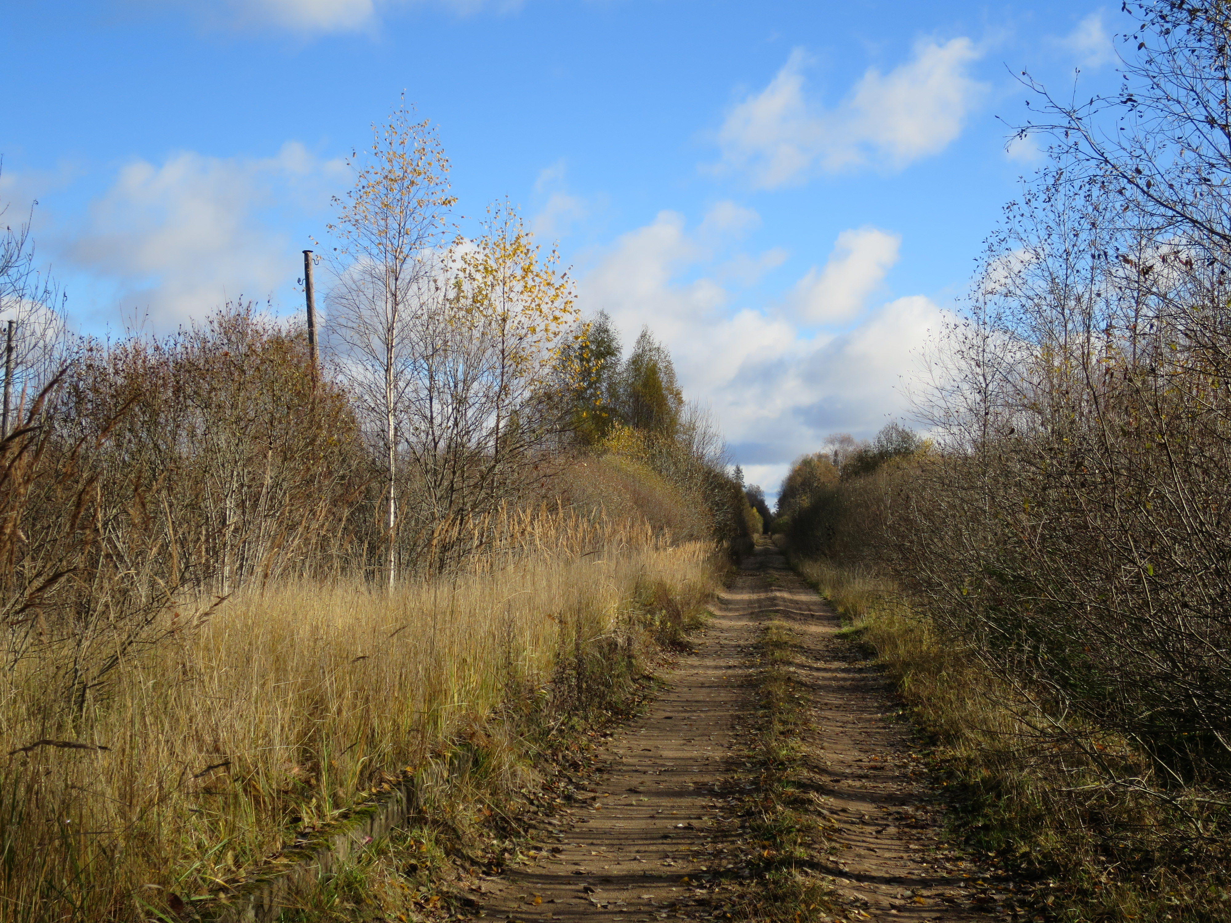 Līčupes pieturas atrašanās vieta